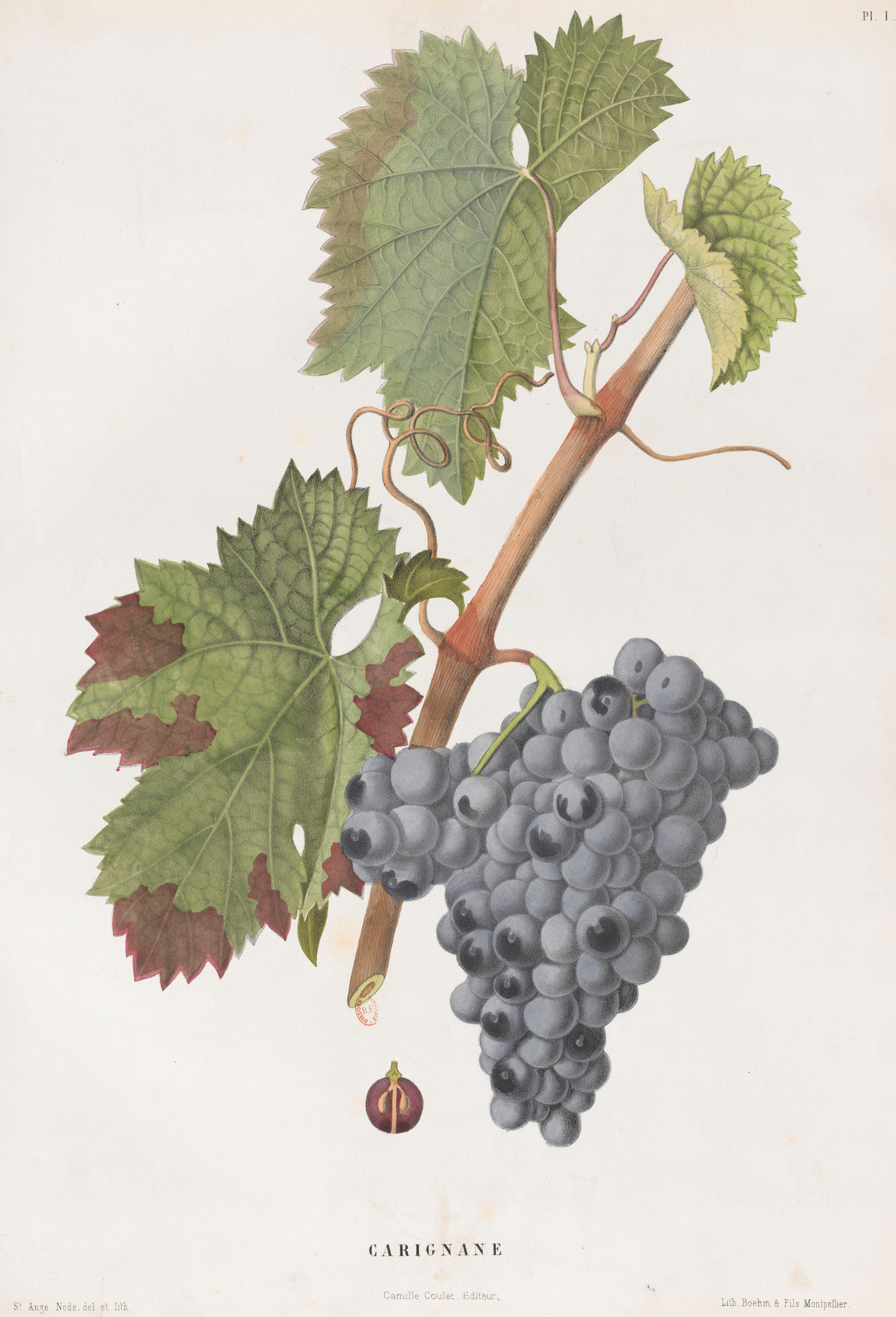 Lithographie du cépage Carignane